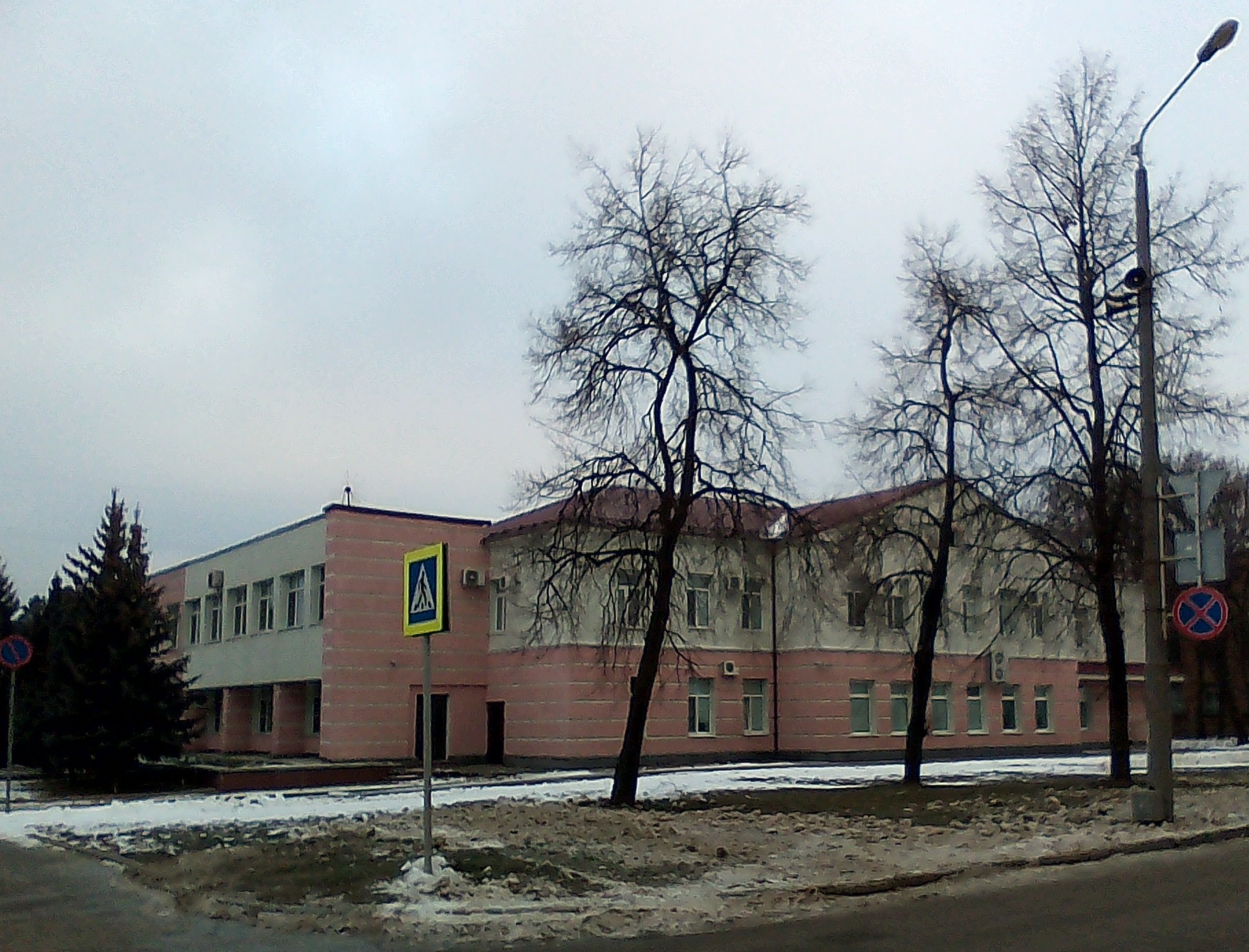 улица Проценко